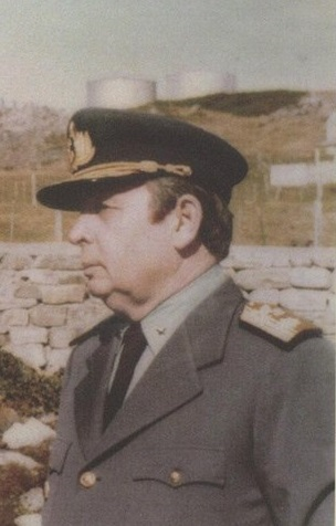 Contraalmirante Gualter Oscar Allara.